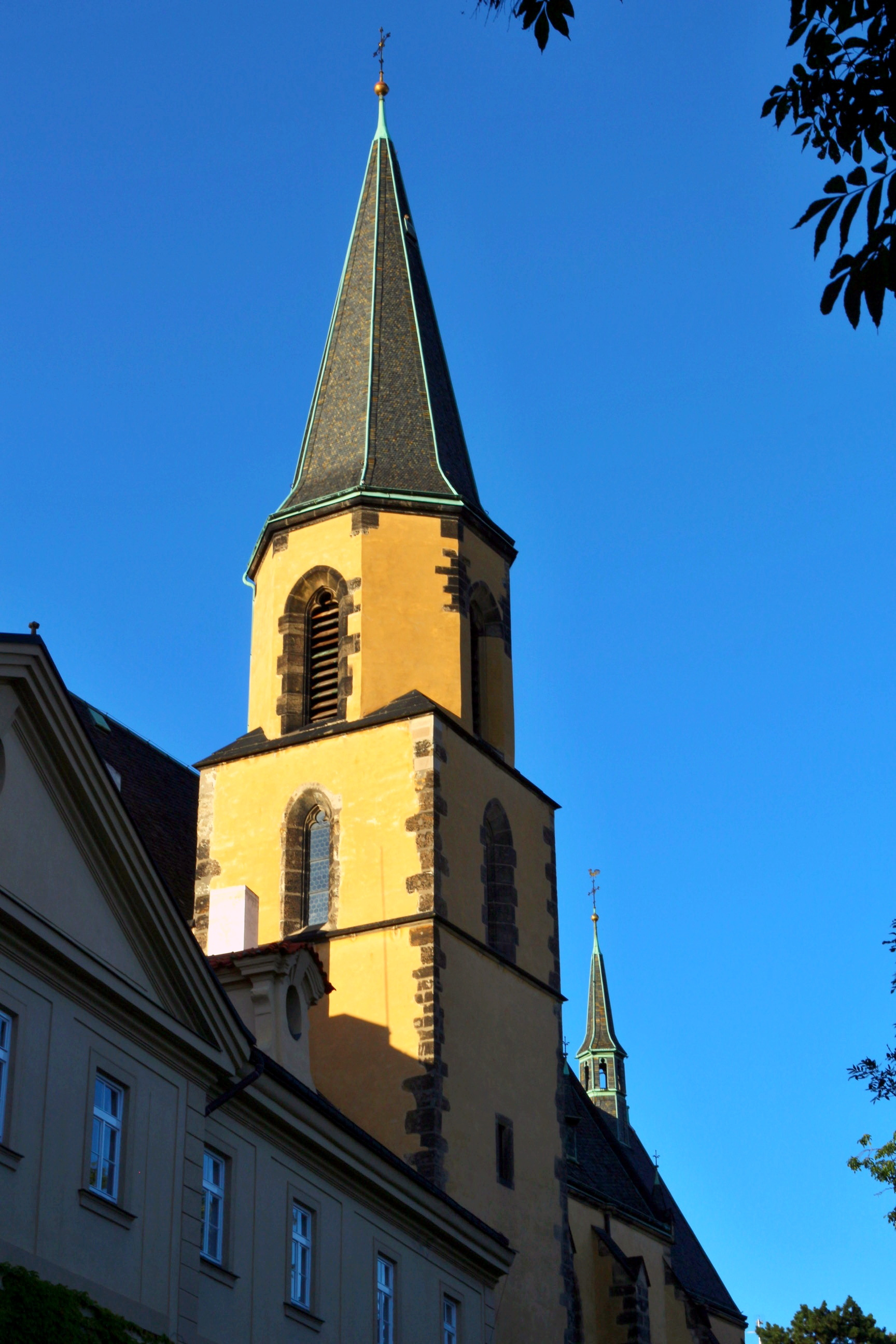 Kostel svatého Apolináře v Praze